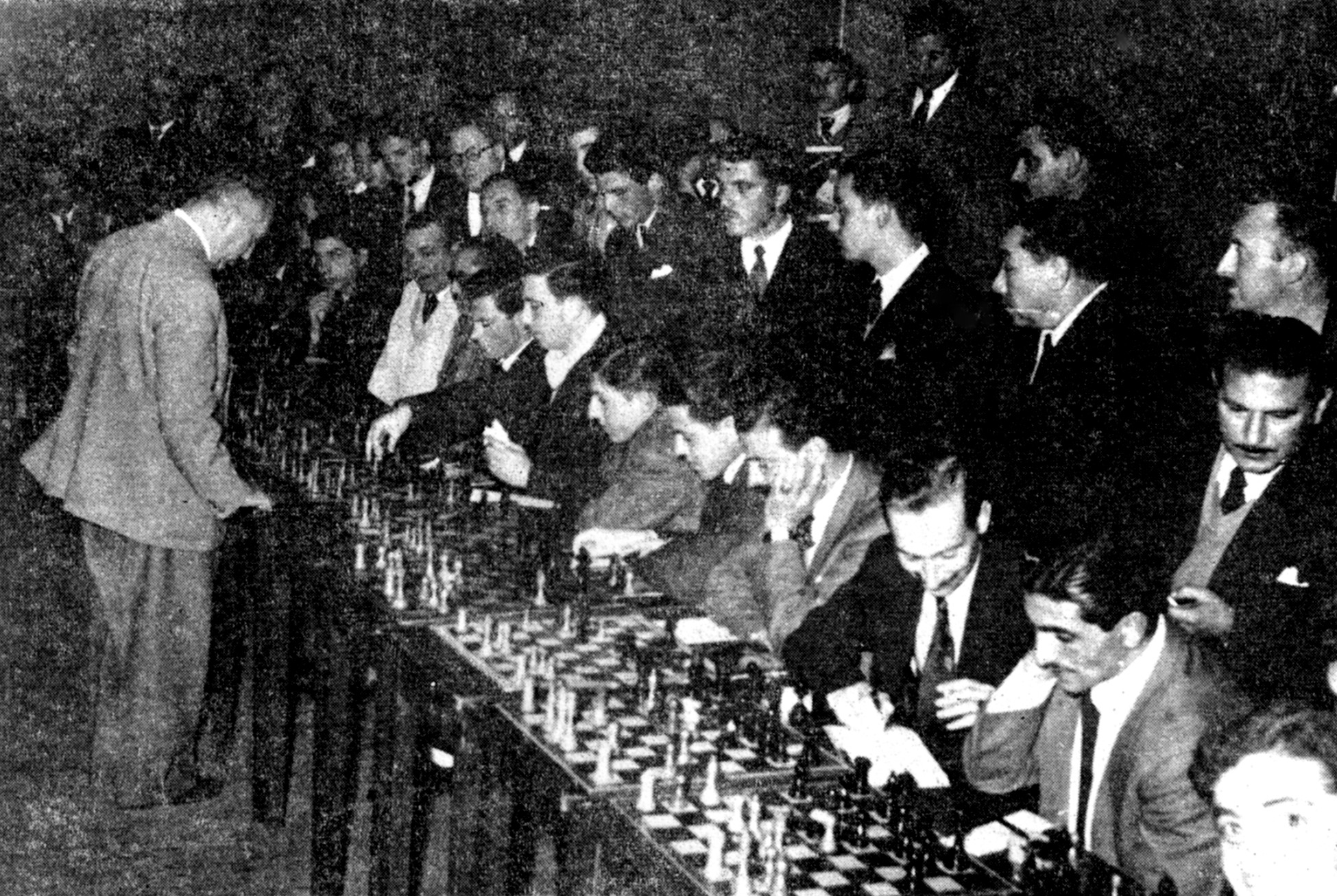 Miguel Najdorf jugando simultáneas en el Círculo Italiano de Junín, Argentina, en 1955.